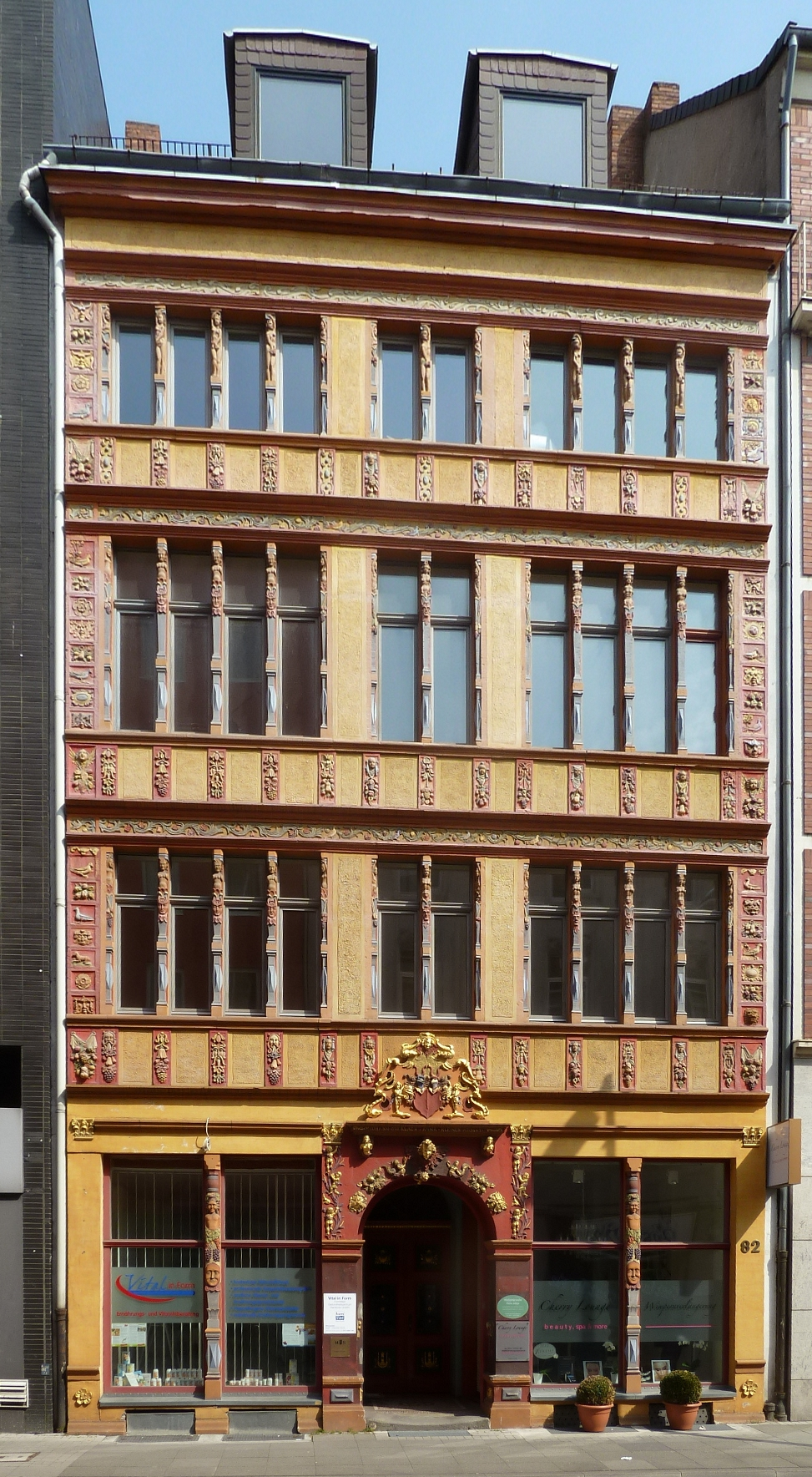 Renaissance-Fassade Lavesstraße, Hannover